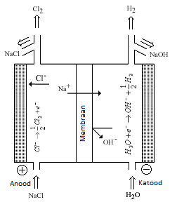 Kloorleeliste elektrolüüsi rakk